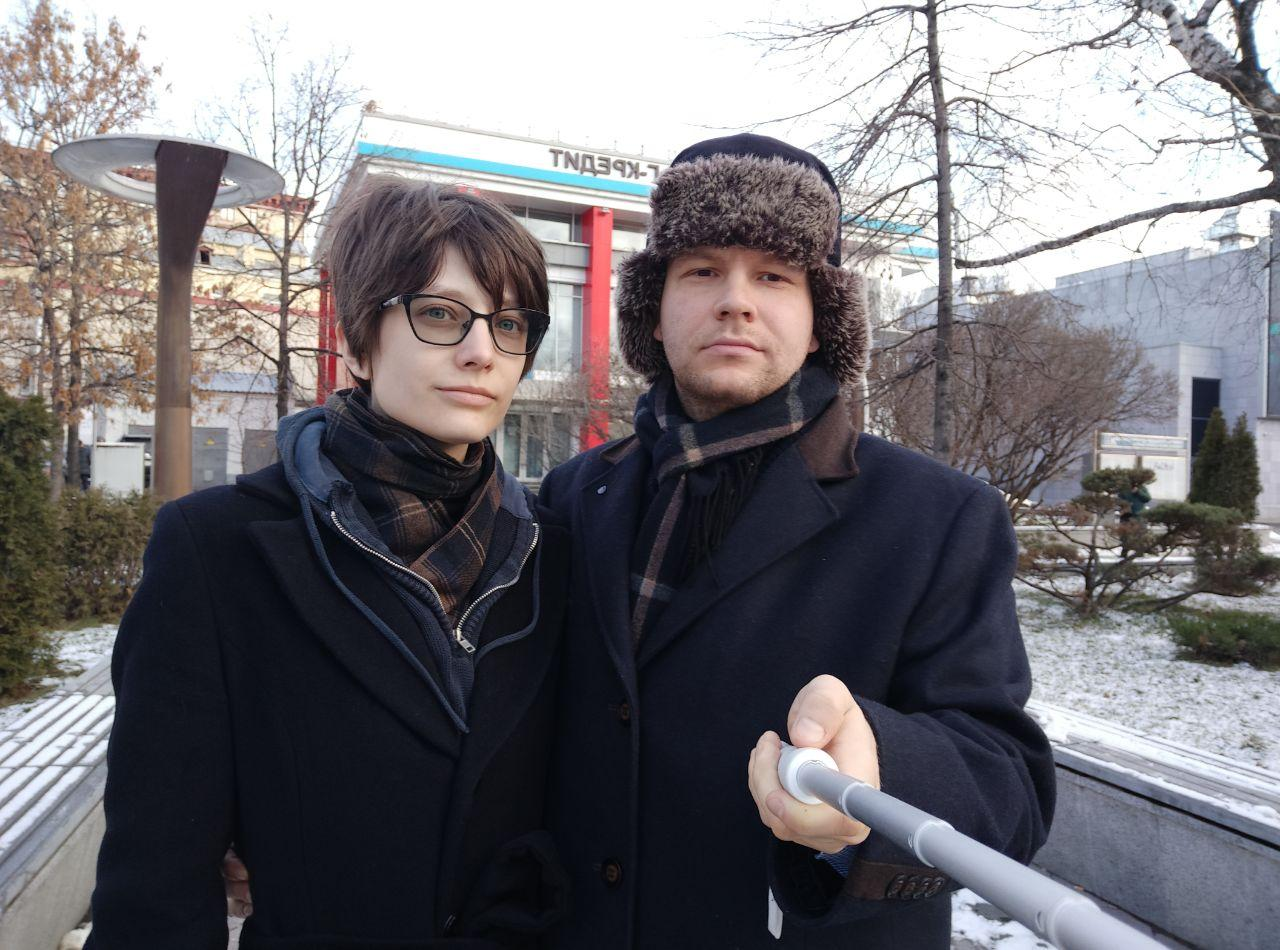 Николай Кавказский и его жена Ирина Забелина